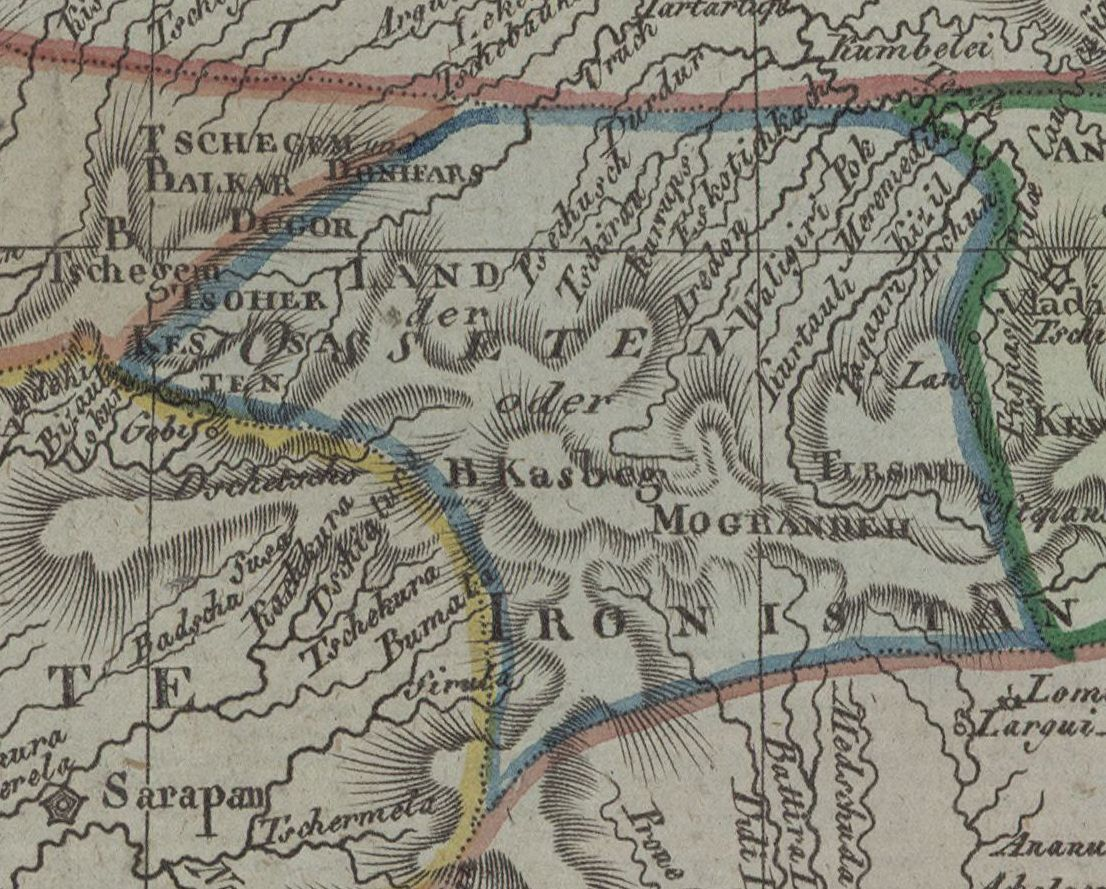 Charte von Laender am Caucasus nach den besten vorhand Charten, Reisen und Astronomischen Ortsbestimmungen / gegeichnet von I.C.M. Reinecke